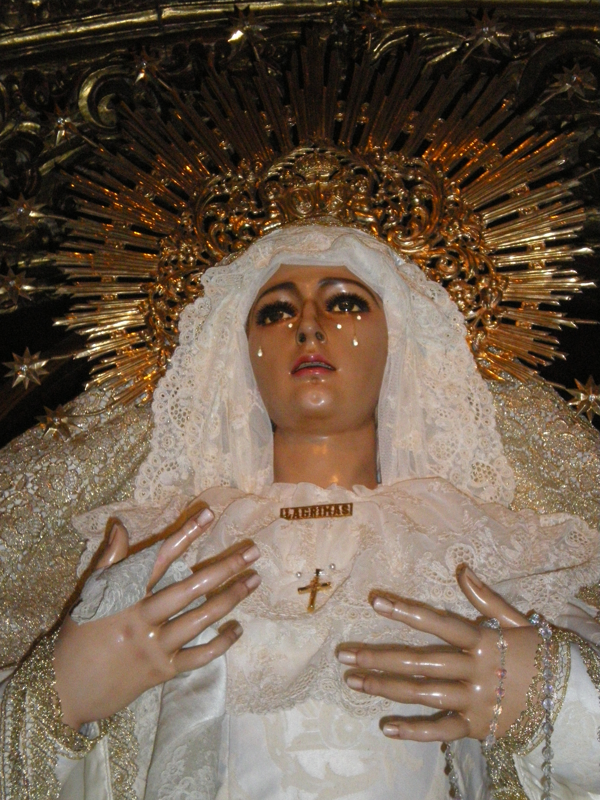 Ntra. Sra. de las Lágrimas de Utrera